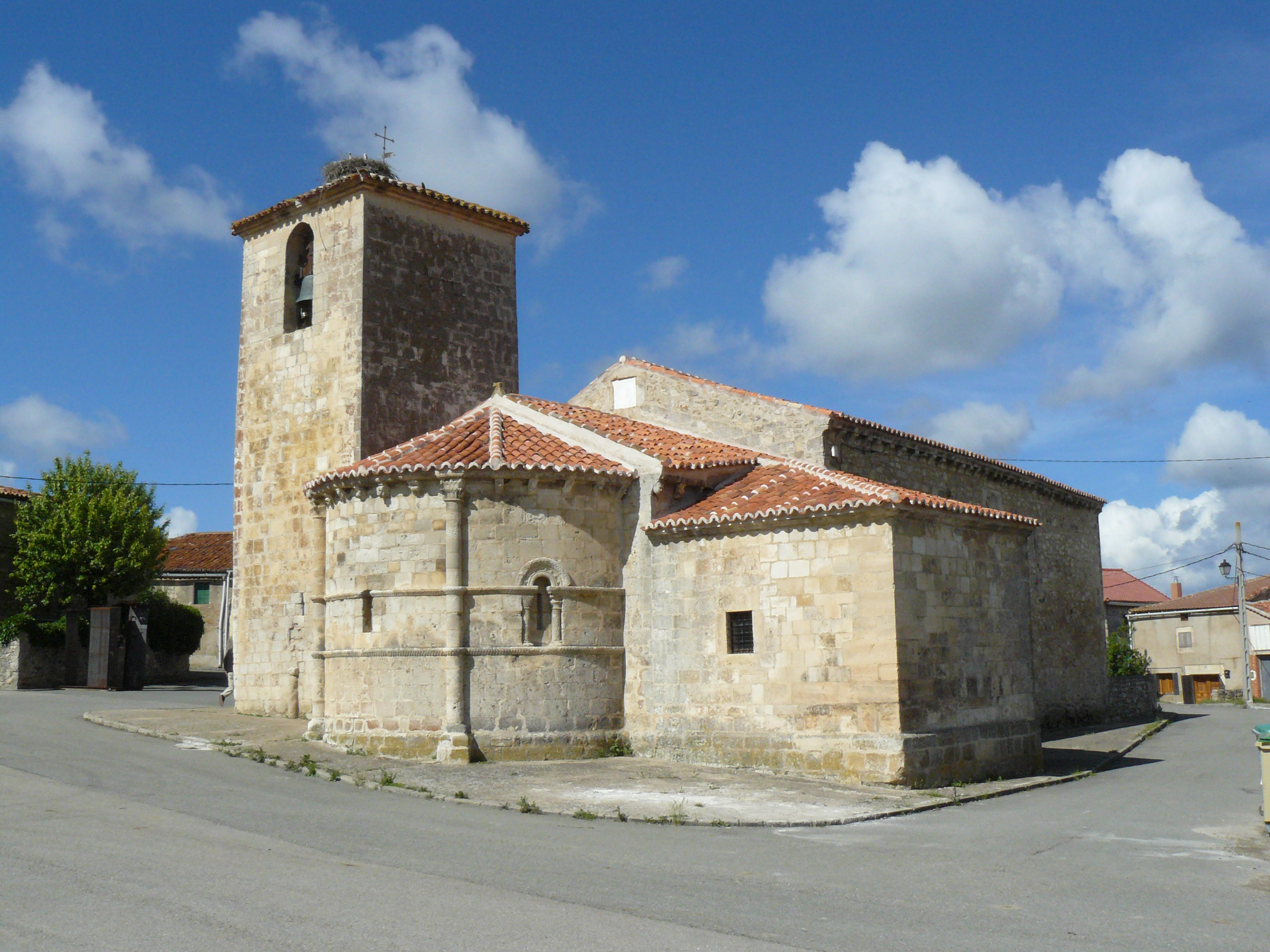 Iglesia de San Bartolomé y capilla de San Galindo, Campisábalos, Guadalajara.